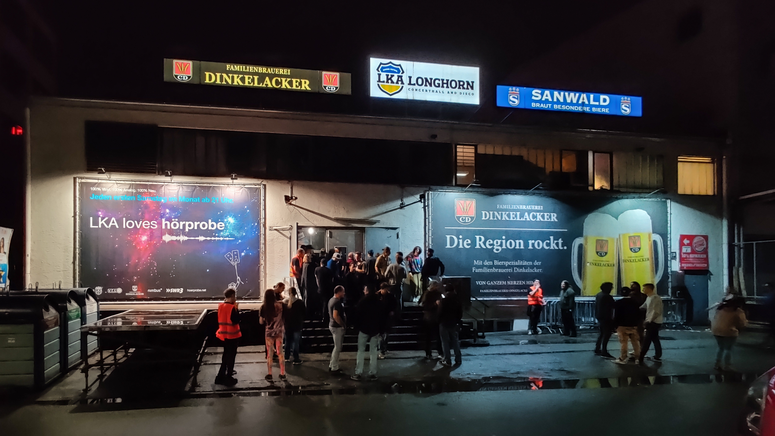 Haupteingang des LKA Longhorn in Stuttgart.